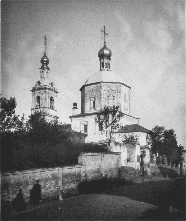 Церковь апостолов Петра и Павла у Яузских ворот (на Кулишких)